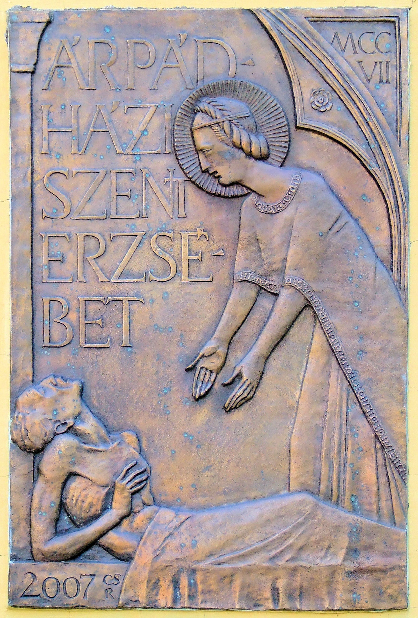 Dombormű a szentendrei Szent Péter és Pál-templom falán. Állították a jubileumi Szent Erzsébet-év alkalmából. Csíkszentmihályi Róbert alkotása